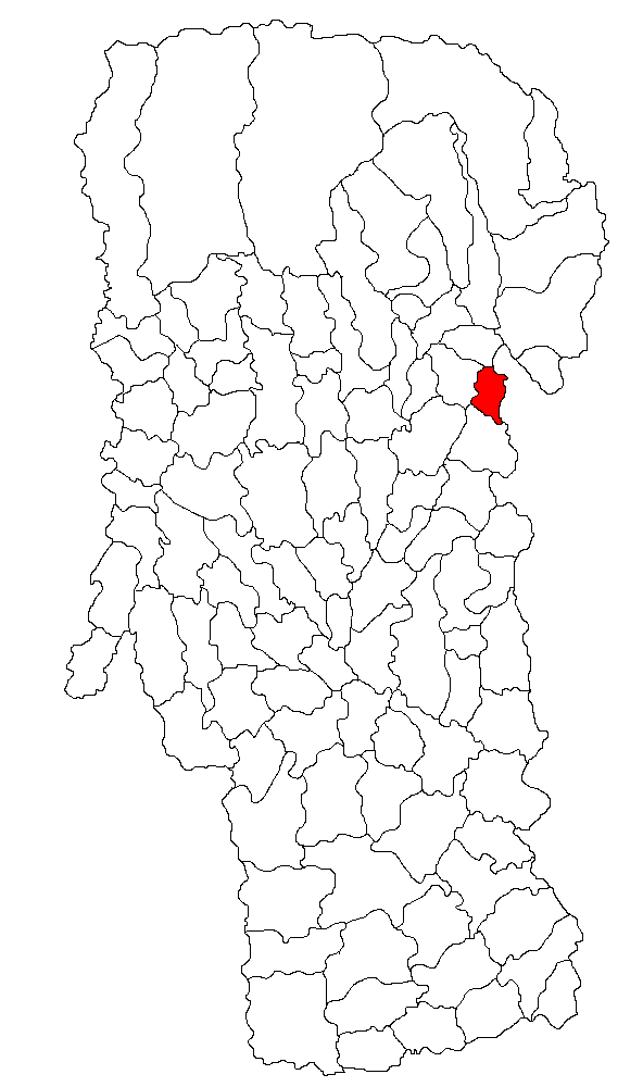 Categorie:Hărţi ale judeţului Argeş